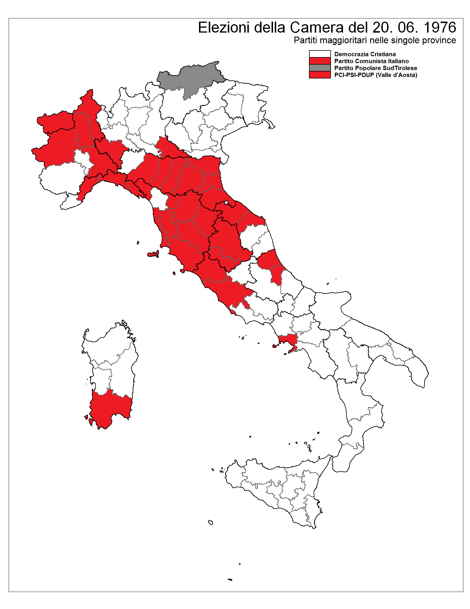 Partiti maggioritari nelle province, voto 1976 Licensing L'immagine l'ho fatta io.